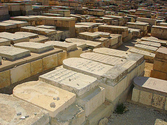 Jerozolima, 23 X 2007 r., zachodnie zbocze Góry Oliwnej.